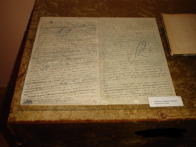 Manuscrito de Chéjov